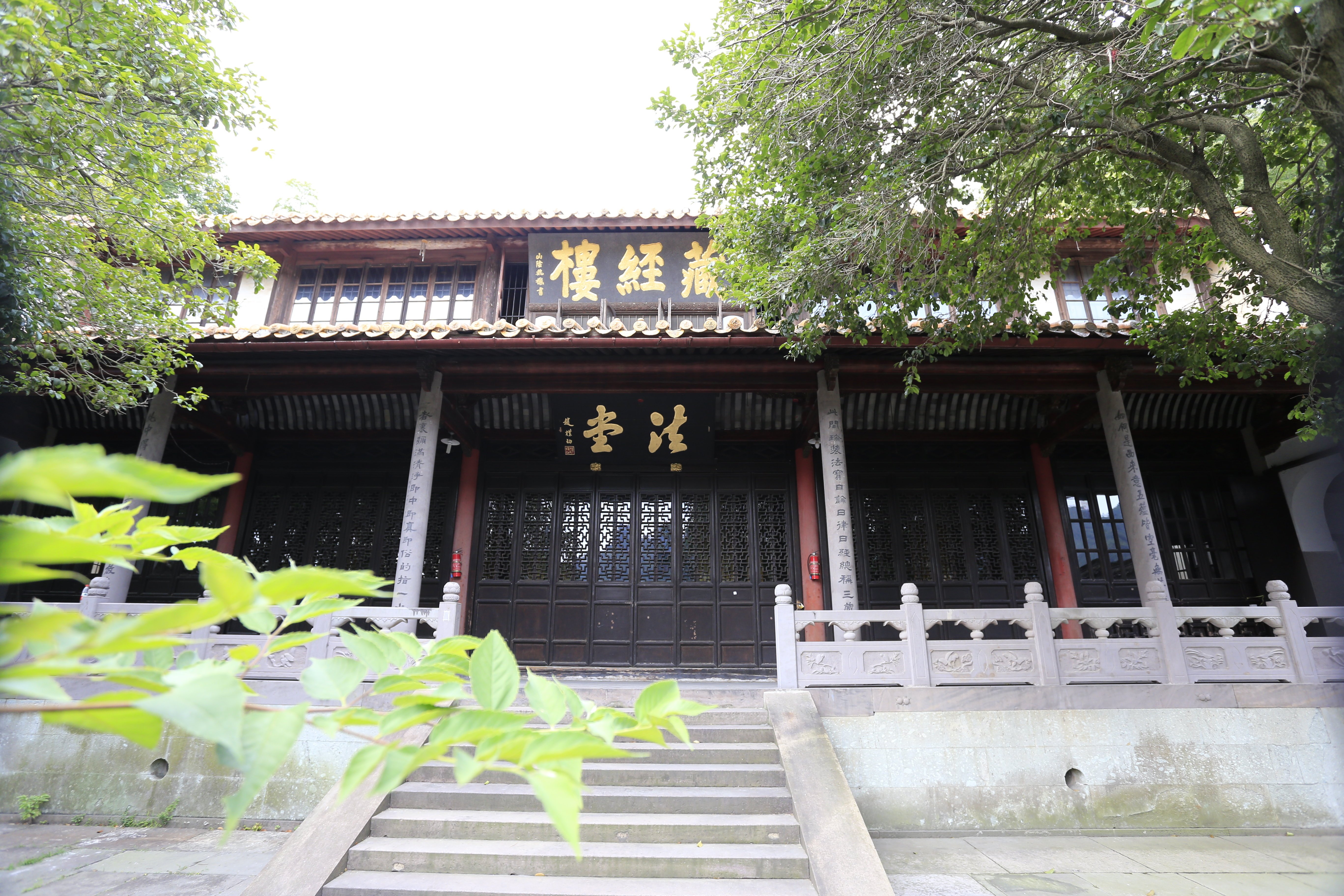 宁波阿育王寺 —— 法堂（藏经楼）